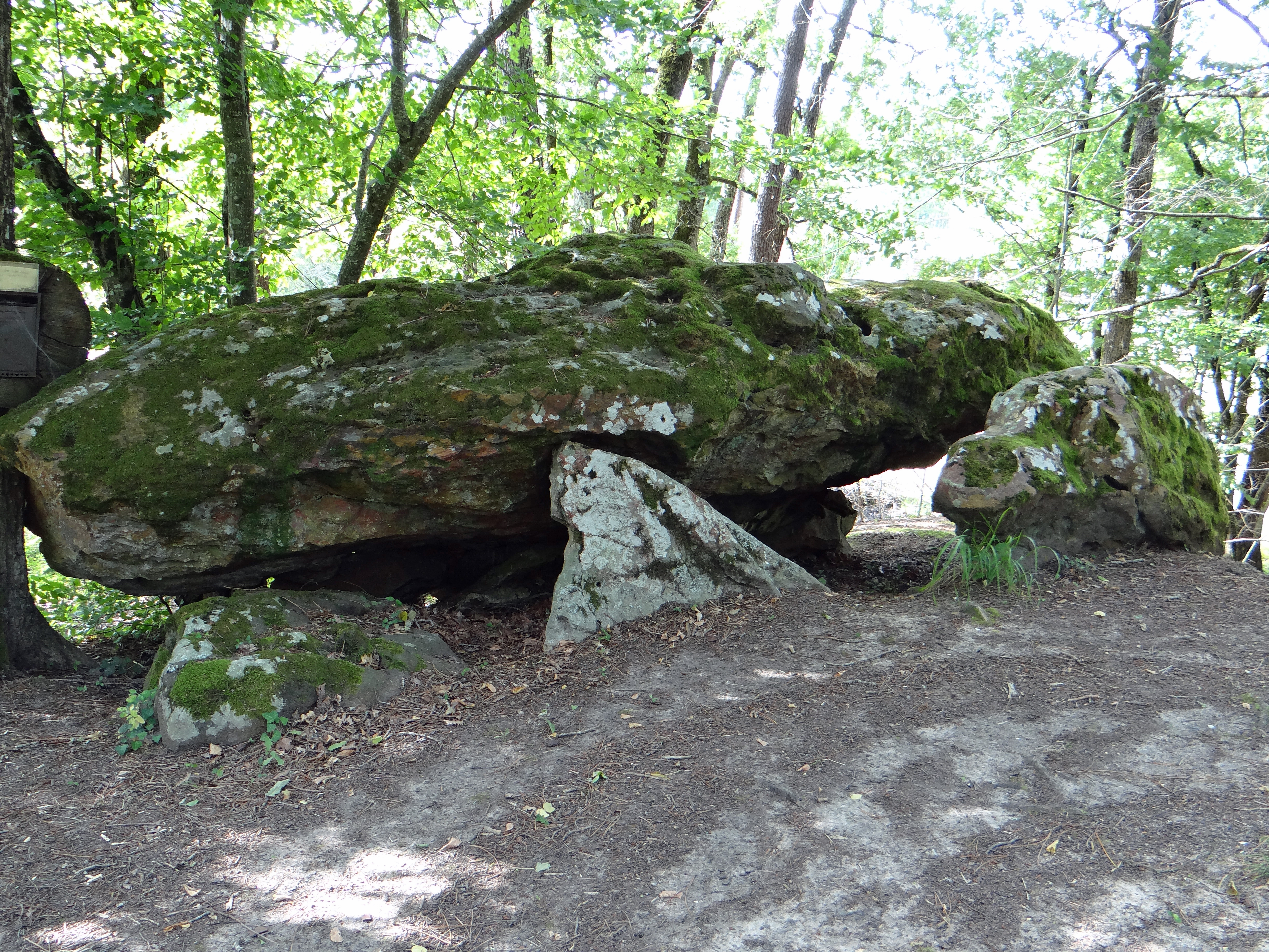 Vergt-de-Biron (Labrame) - Allée du Point du Jour